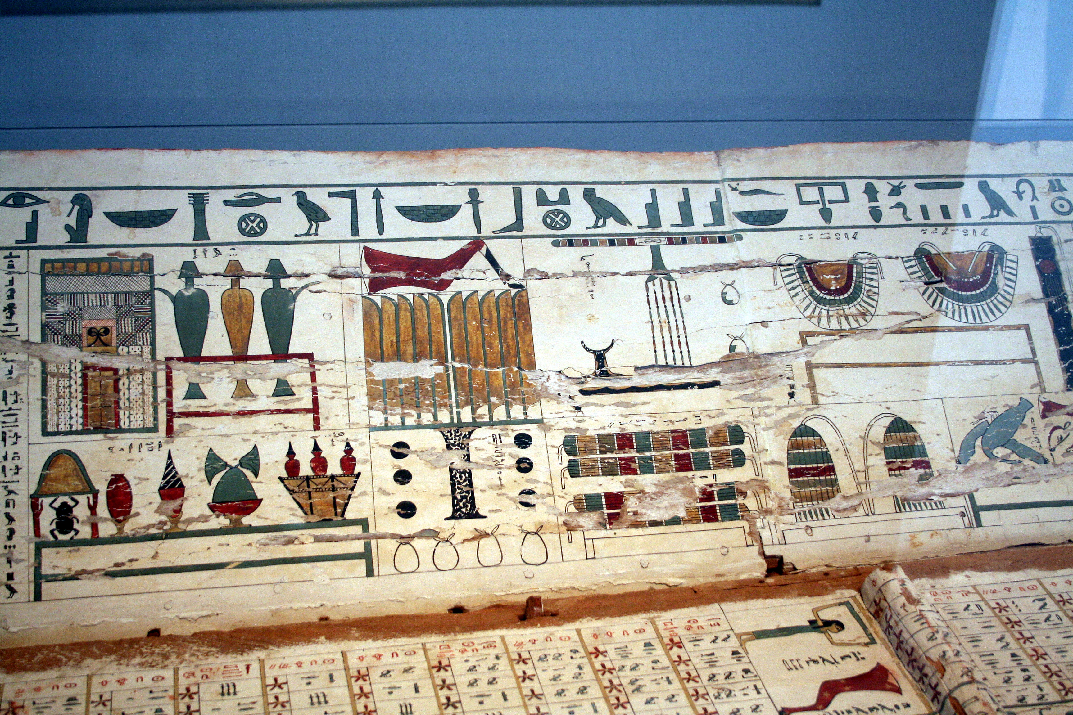 Sarg des Nacht, wohl aus Assiut, 11./12. Dynastie